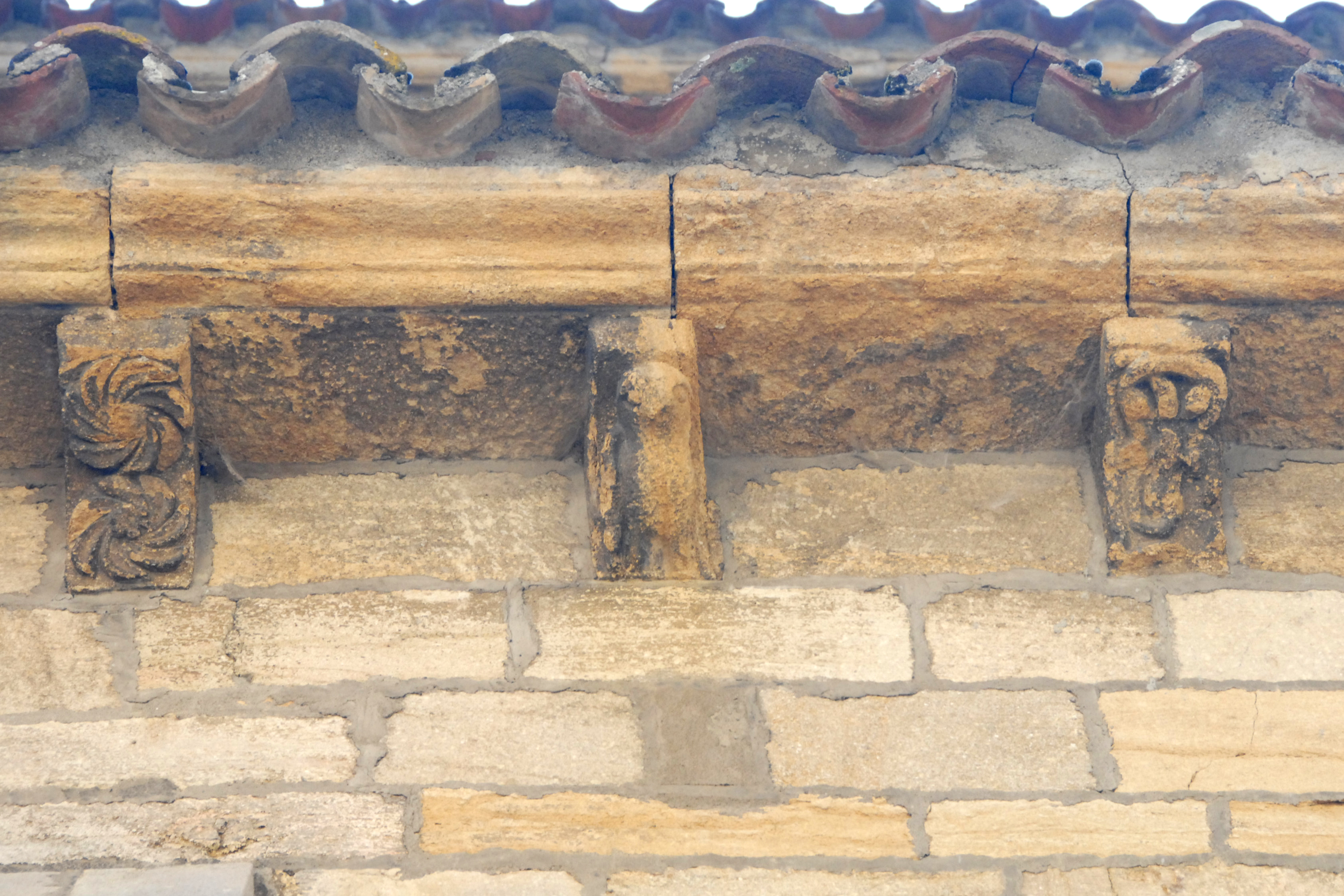 St-Hilaire de Semur-en-Brionnais, Traufgesims Langhaus 4